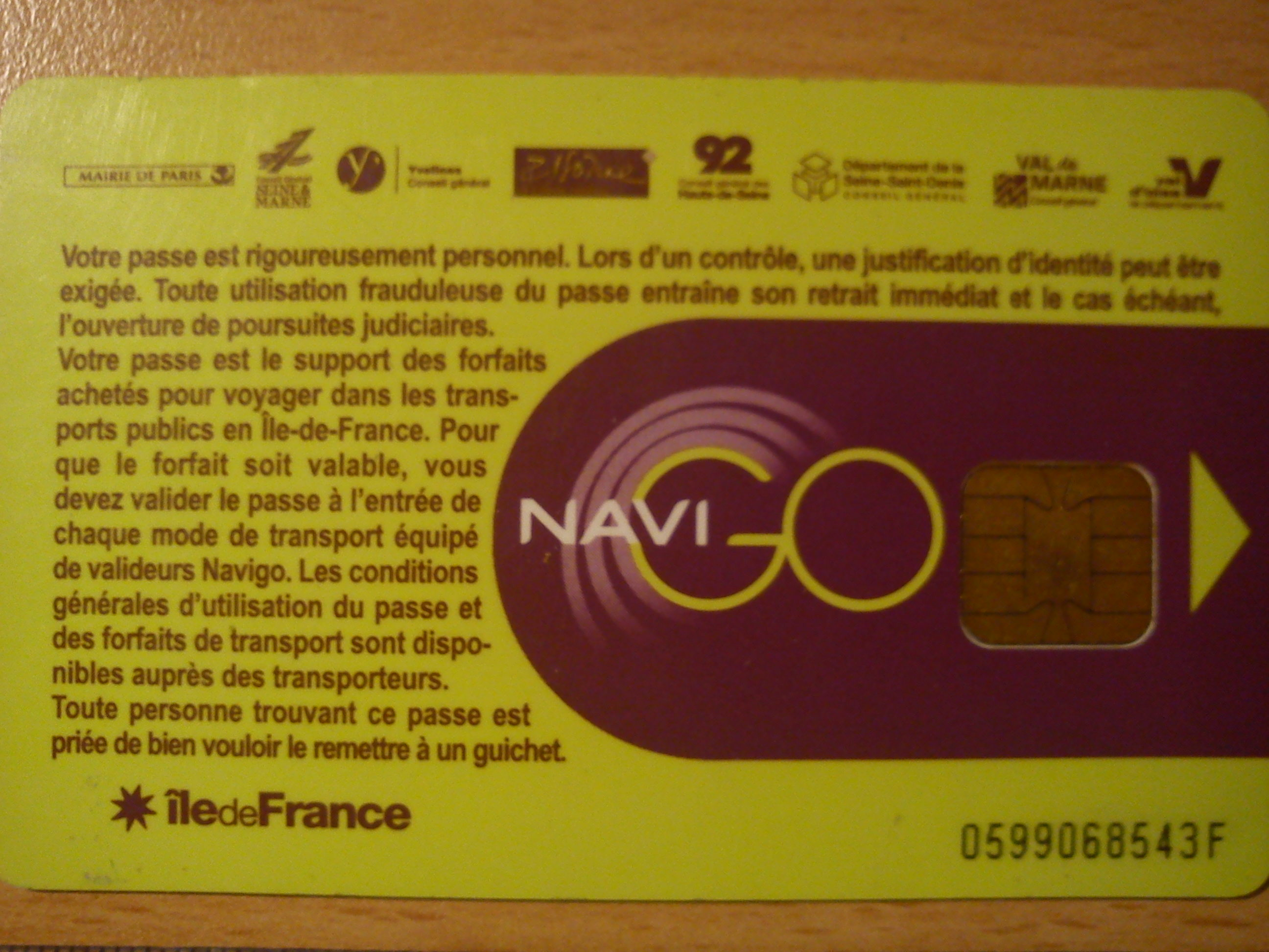 Verso d'une Carte imagine'R.